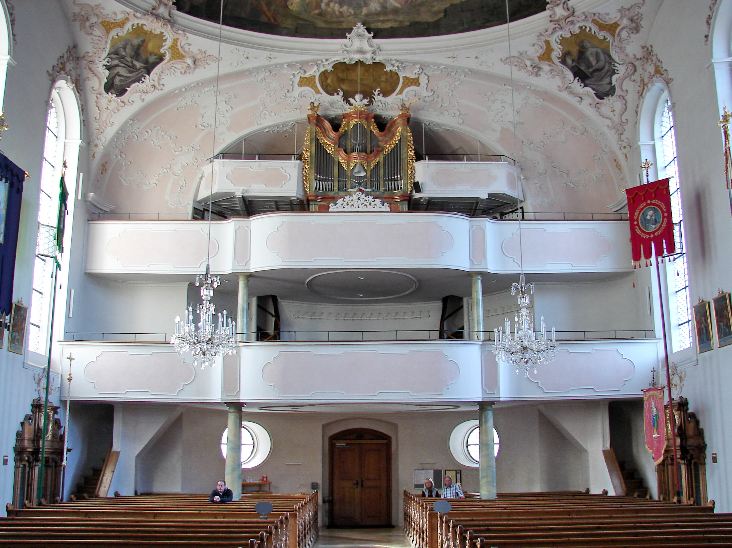 Das Wahrzeichen von Mittenwald ist der 1746 fertiggestellte, mit den Kirchenpatronen, Petrus und Paulus, bemalte Kirchturm.